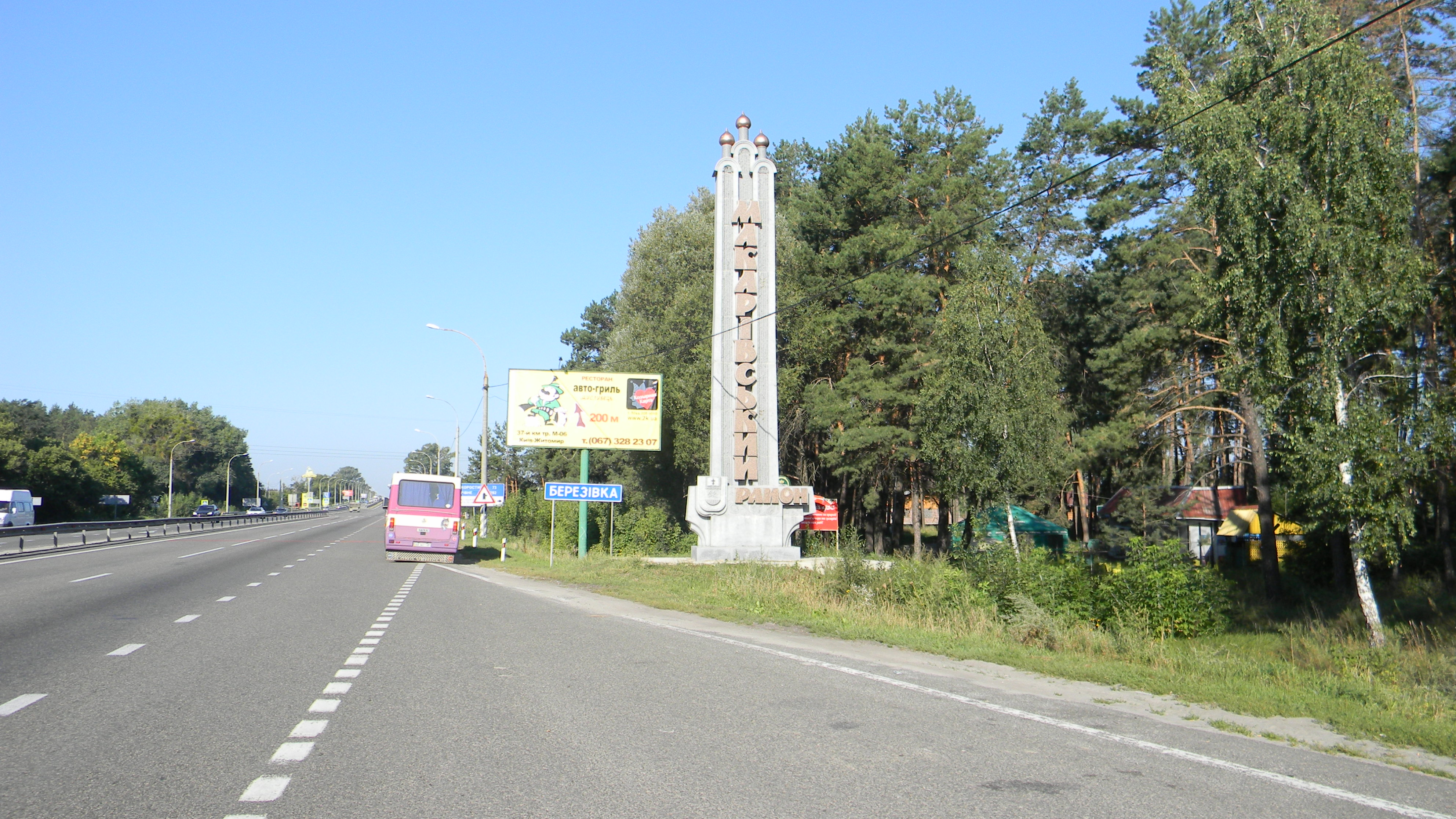 В'їзний знак у с. Березівка